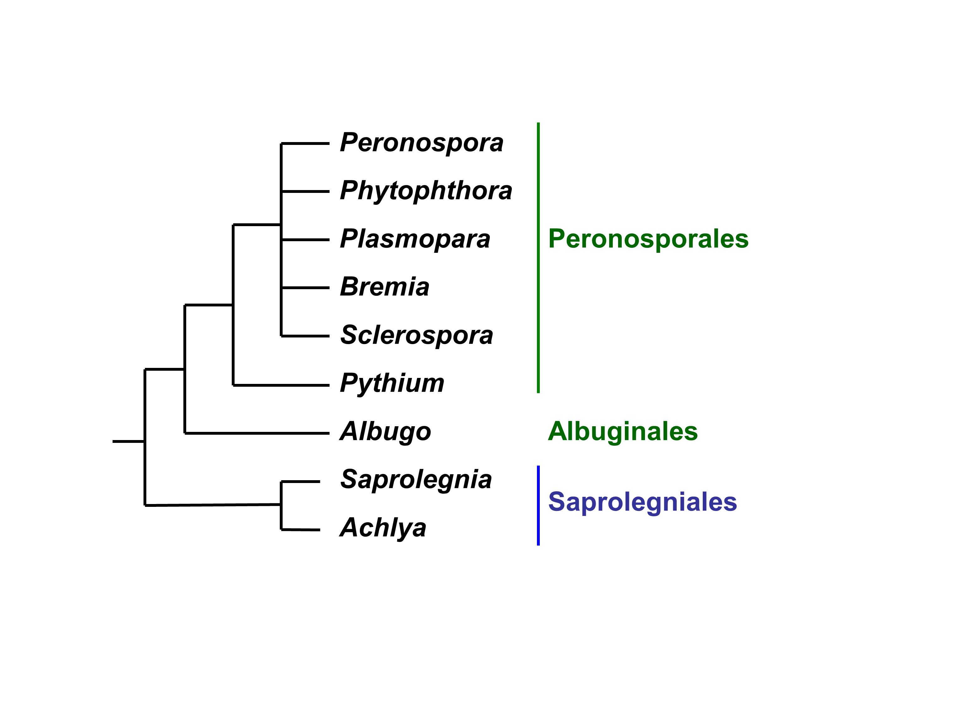 Biologische Schemata, gezeichnet und freigegeben von M. Piepenbring